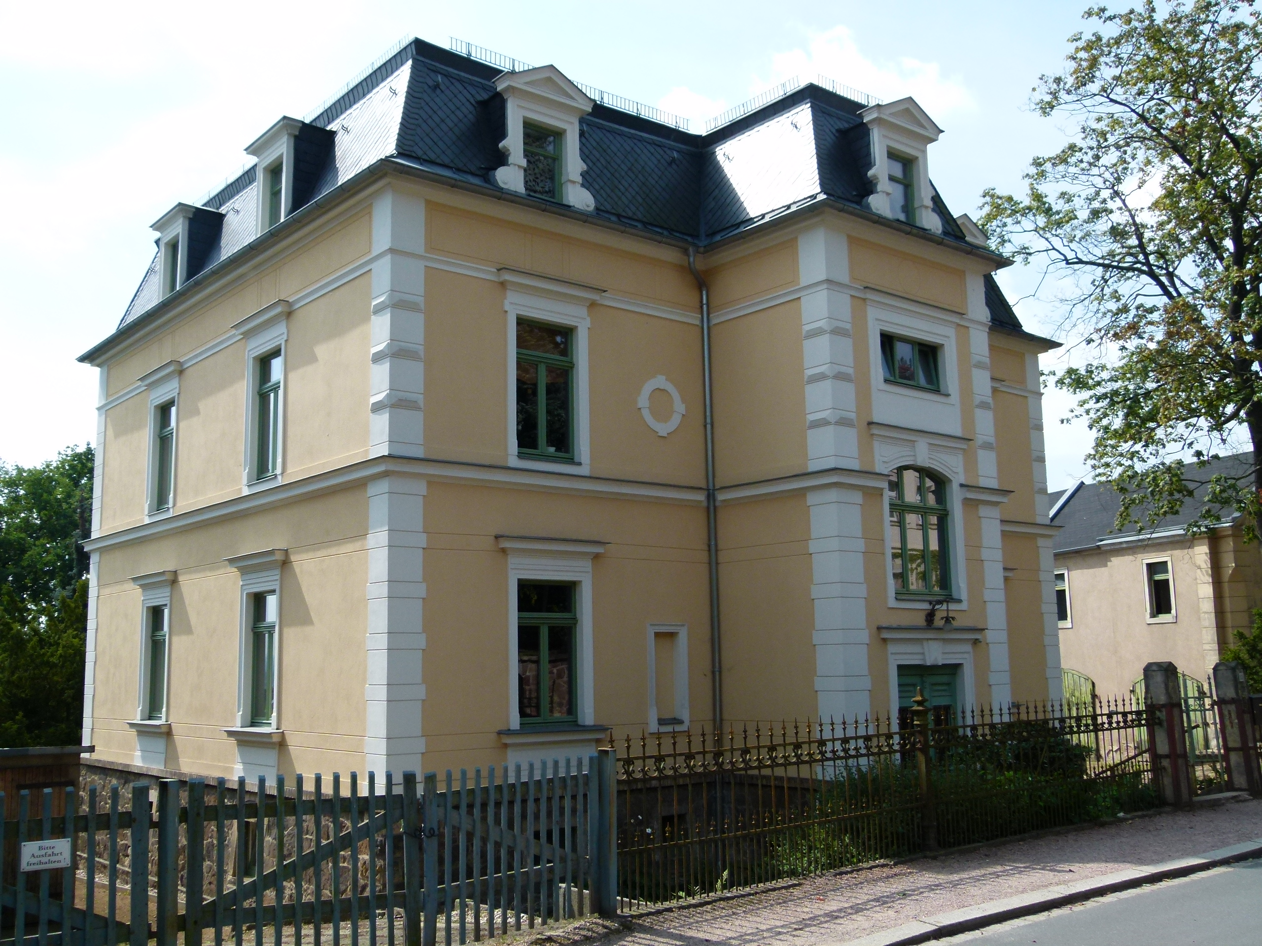 Denkmalgeschütztes Haus, Obere Bergstraße 13, Radebeul, Sachsen